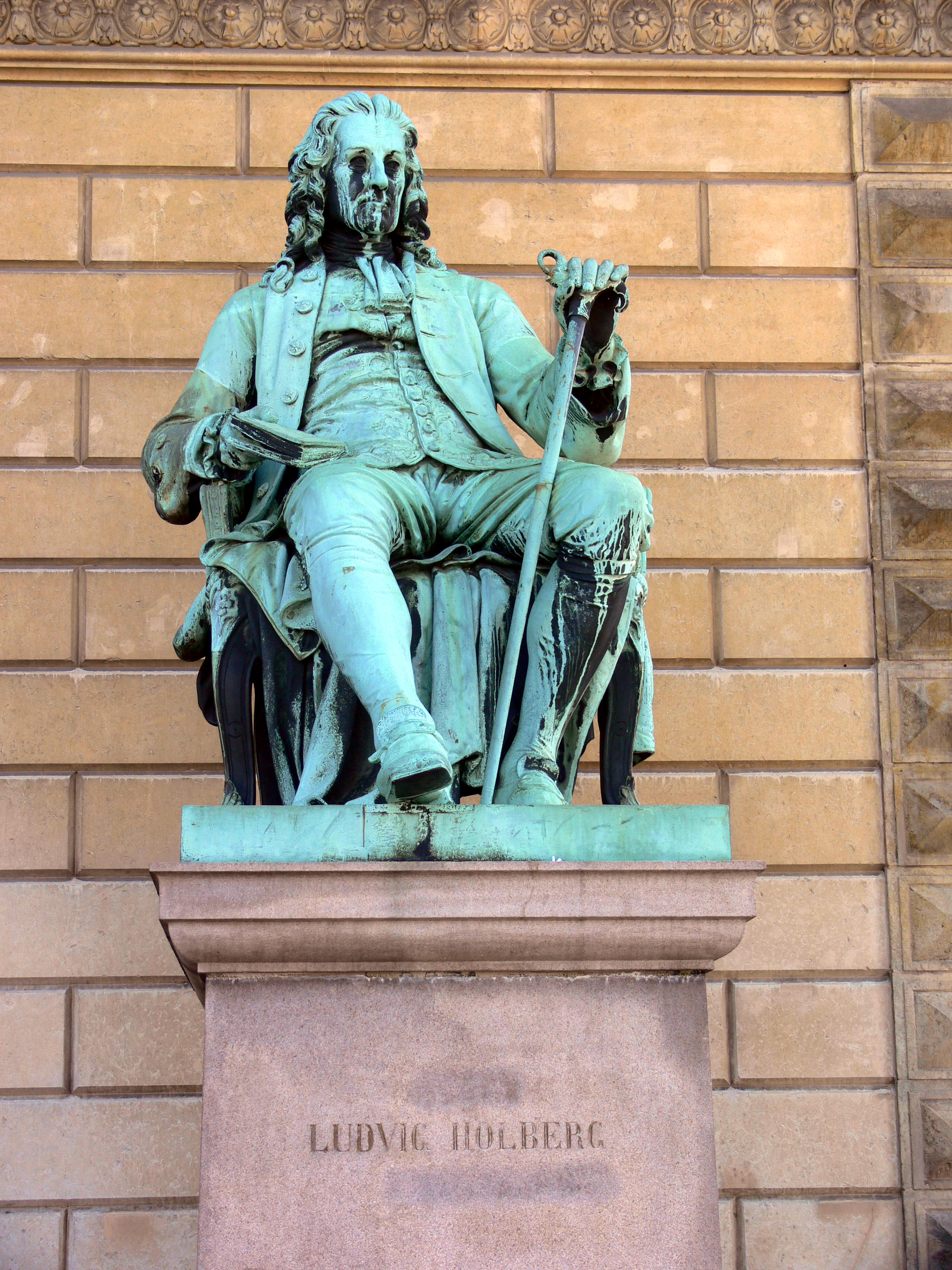 Dichter Ludvig Holberg (1684–1754)